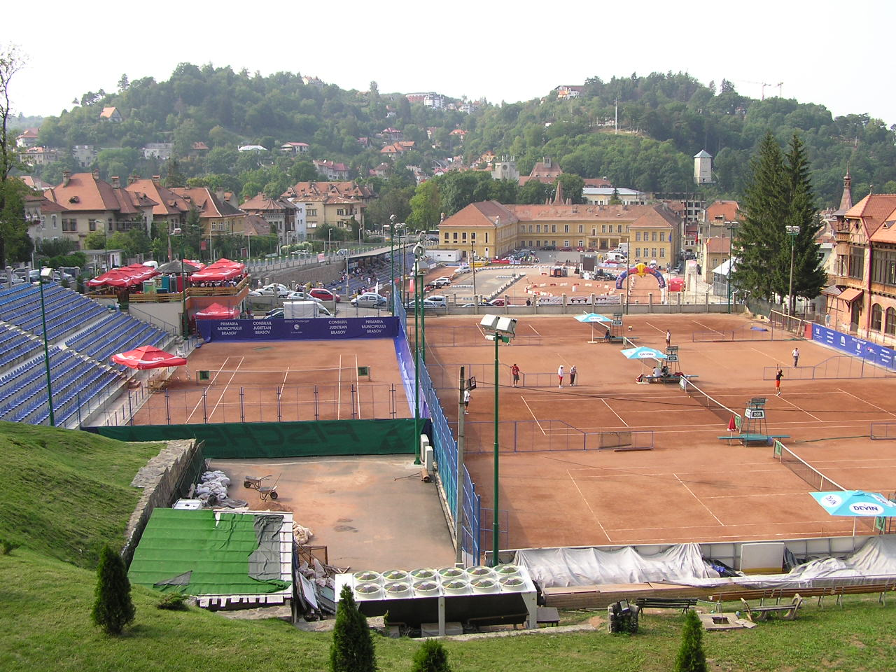 Tennis Stadien des Sportkomplexes „Olimpia“ aus Braşov, Rumänien